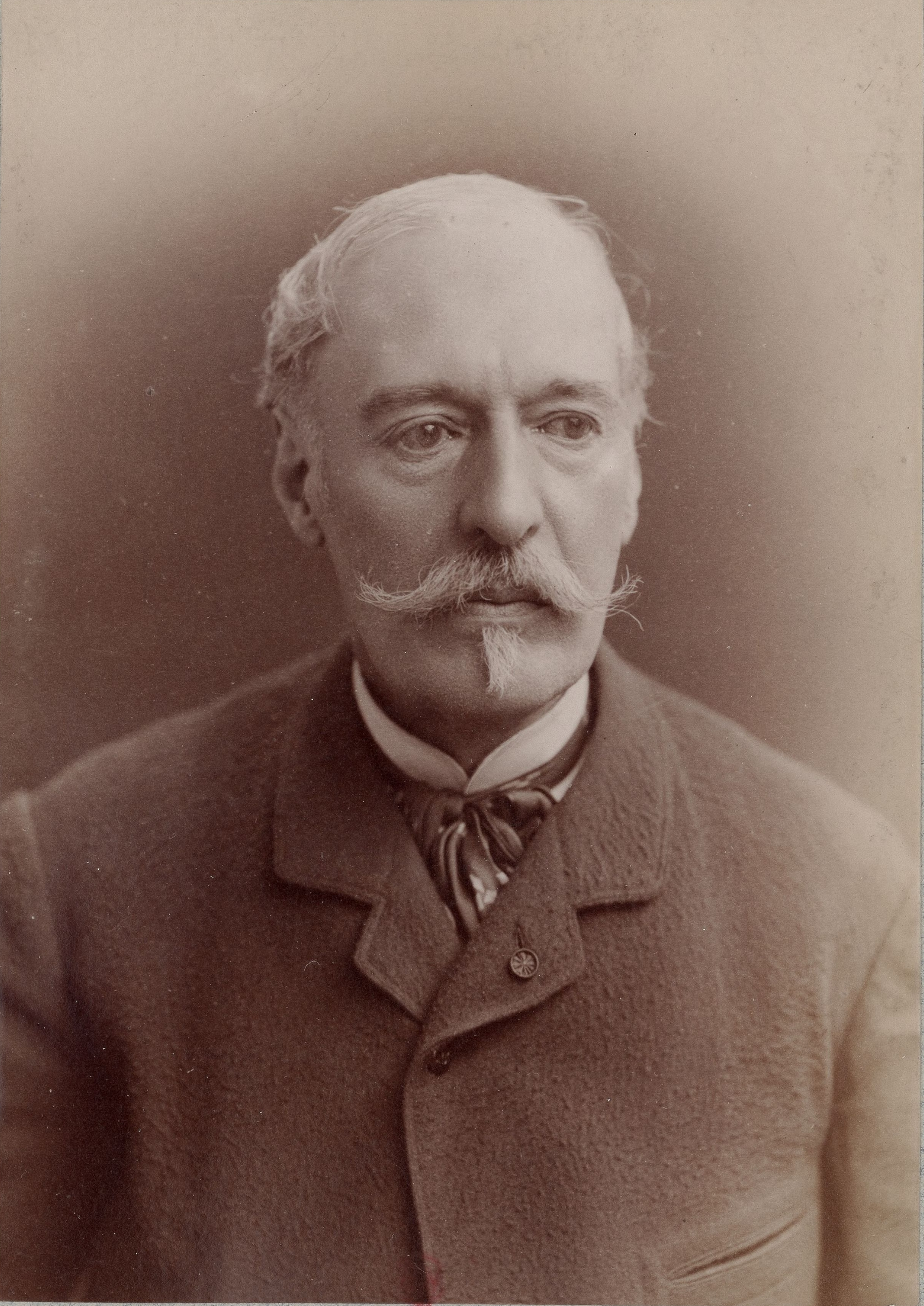 Dumaresq. Peintre.